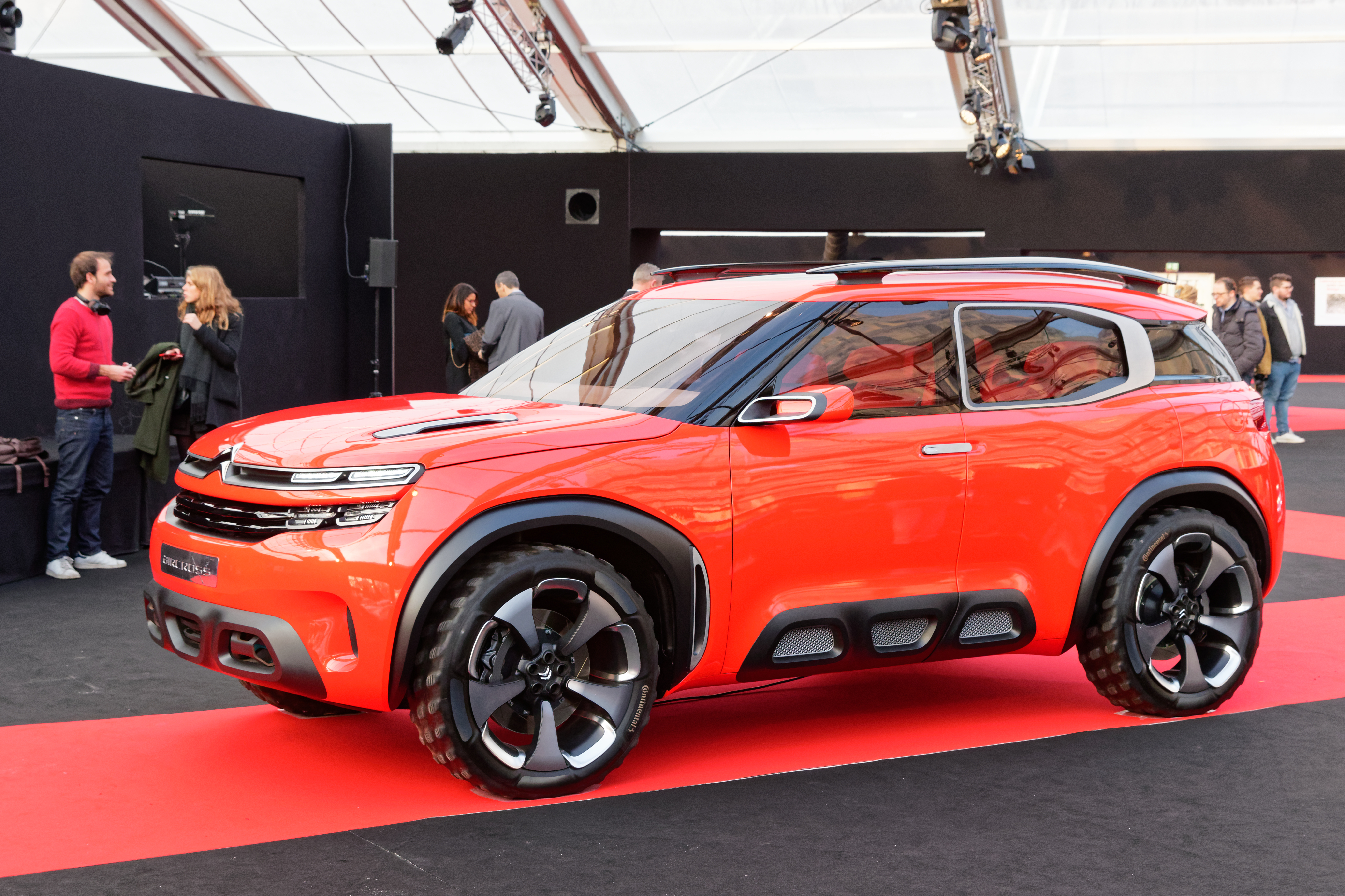 La Citroën Aircross Concept exposée lors du festival automobile international 2016.